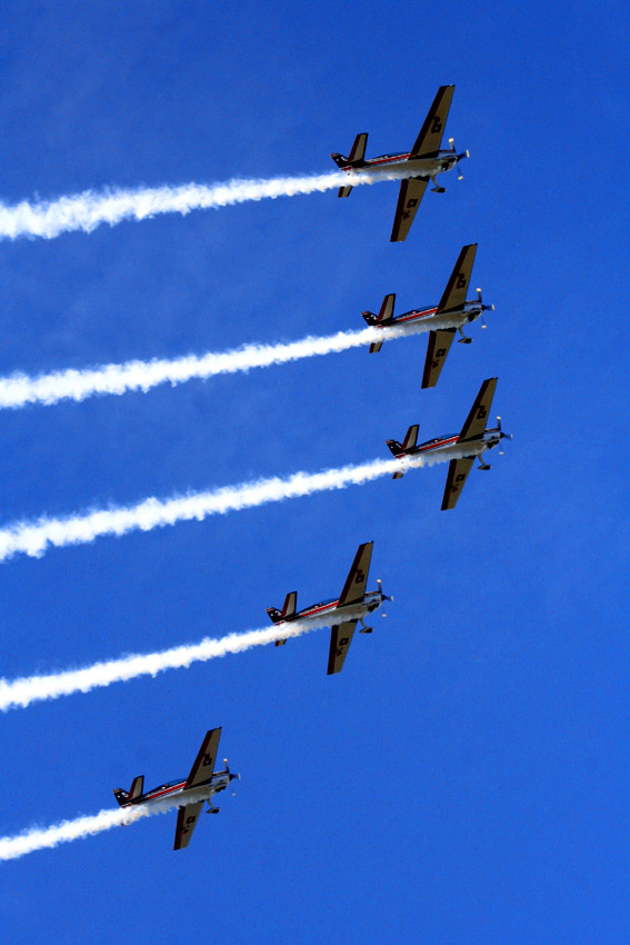 La Escuadrilla de Alta Acrobacia Halcones, llamada simplemente como Halcones, es un grupo de nueve oficiales activos de la Fuerza Aérea de Chile entrenados para hacer acrobacias aéreas, que pueden llegar a ser peligrosas. Generalmente, los aviones de los Halcones dejan una estela de humo de colores, con el cual hacen figuras en el cielo y cierran la muestra aérea con la bandera chilena.